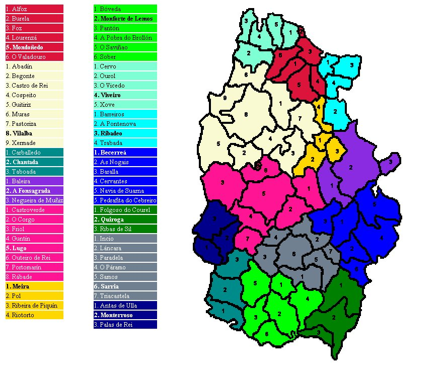 Amosa os concellos de Lugo con cores por comarcas